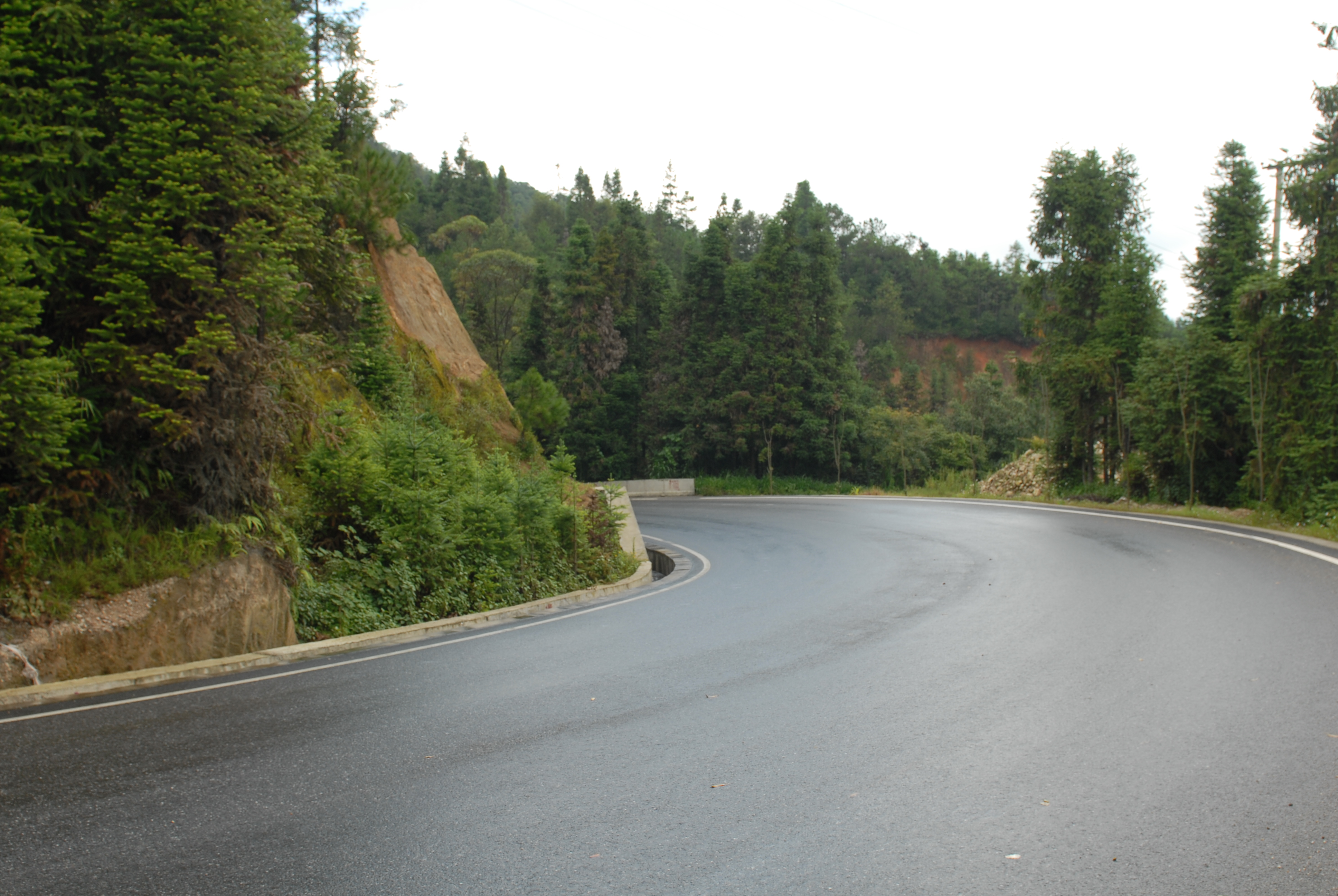 中文（中国大陆）: 320国道云南省龙陵县镇安镇段